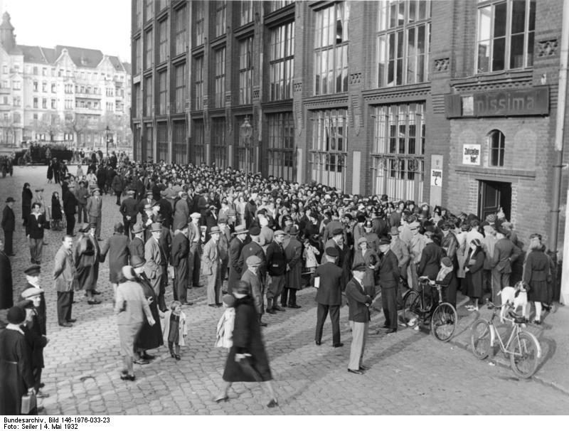 Unruhen vor dem Arbeitsamt Nordost. Durch Zahlungstockungen bei dem Arbeitsamt Nordost am Wilhelm Kreise Ufer in Berlin kam es am 4.Mai 1932 zu grossen Massenansammlungen und Unruhen der Erwerbslosen. Das Bild zeigt die Menschenmenge vor dem Arbeitsamt.